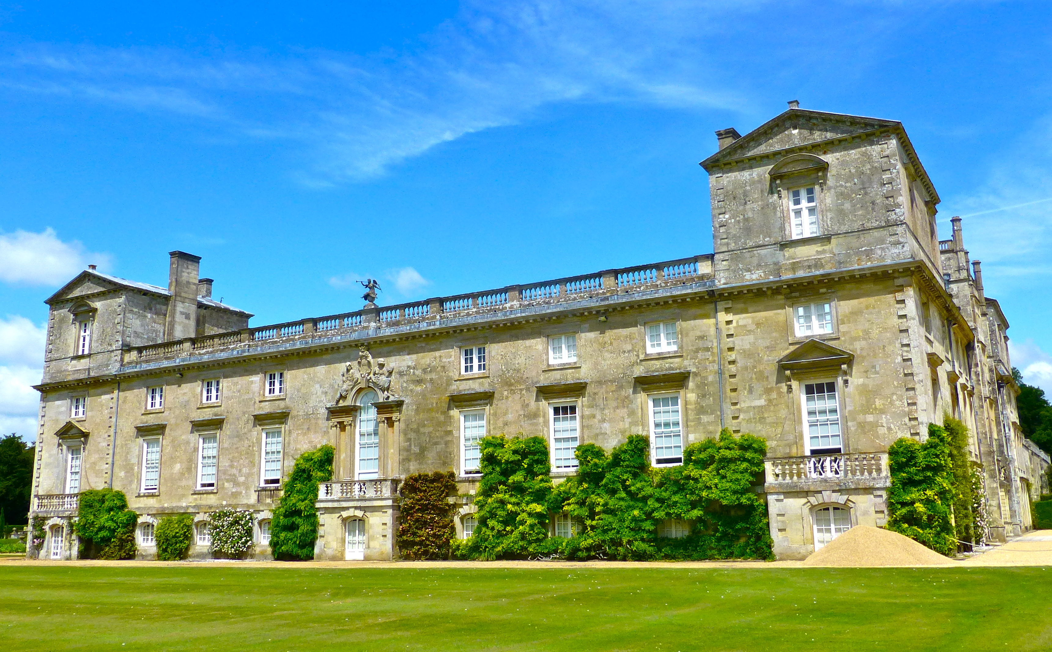 Wilton